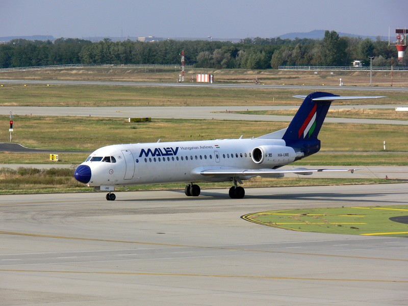 Fokker 70 Malév Hungarian Airlines (HA-LME)